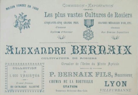 Carte de visite de la maison Alexandre Bernaix à Lyon.